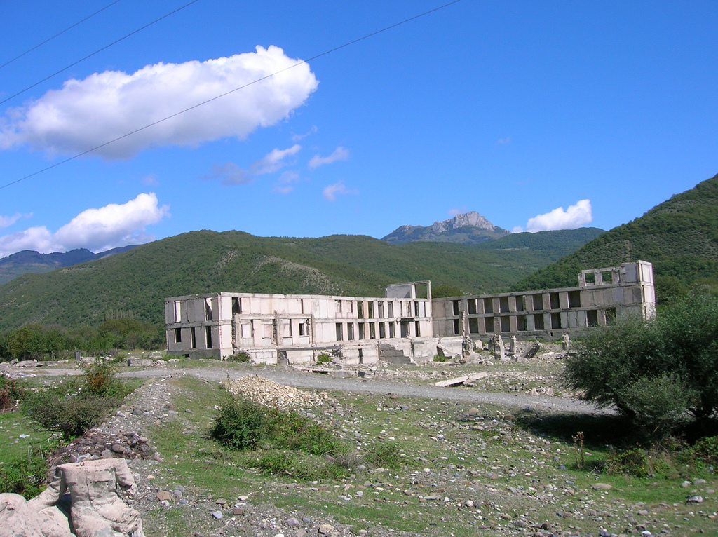 Ruins in Akhalgori